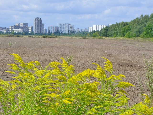 Grossziethen - Ehemalige Rieselfelder (Former Sewage Farms)